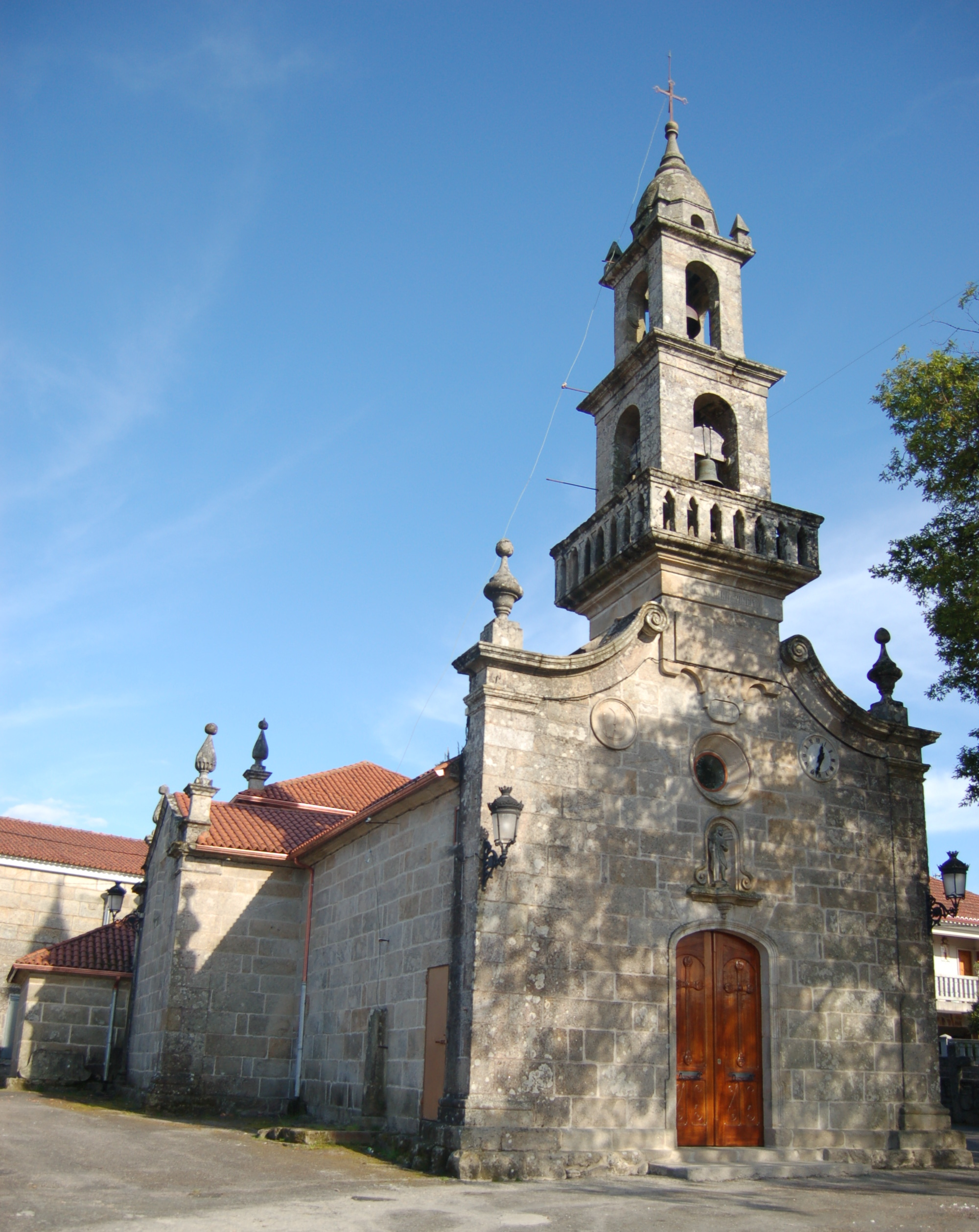 Igrexa parroquial de San Paio de Moscoso (Pazos de Borbén)